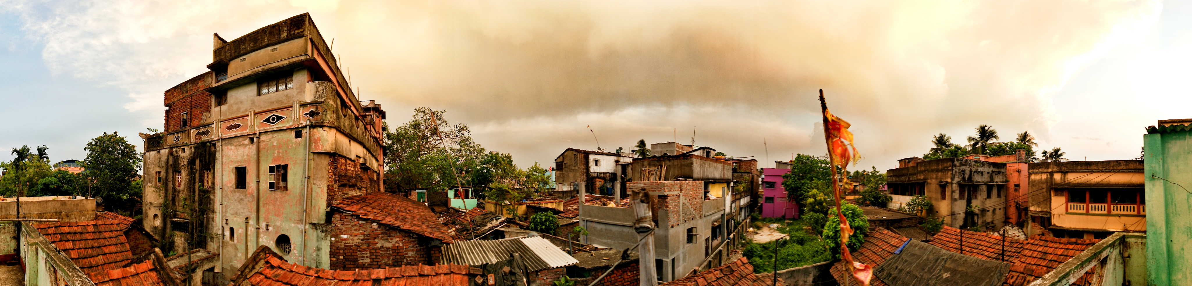 Wide view photo of A place in Naihati